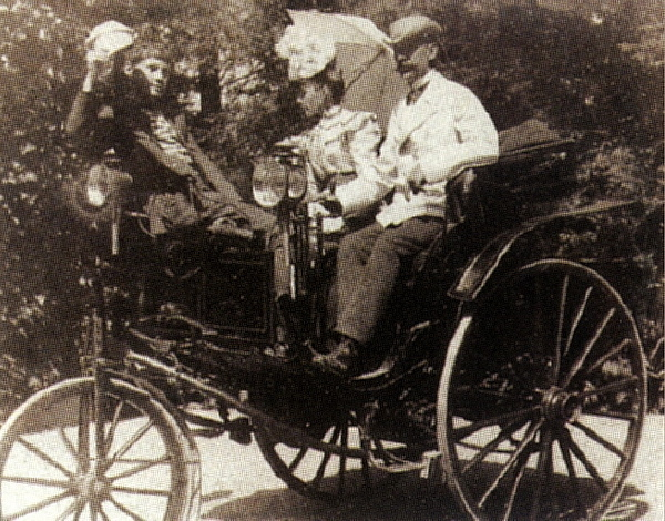 Eugen Zardetti in seinem Benz-Motorwagen vor dessen Umbau von 1898